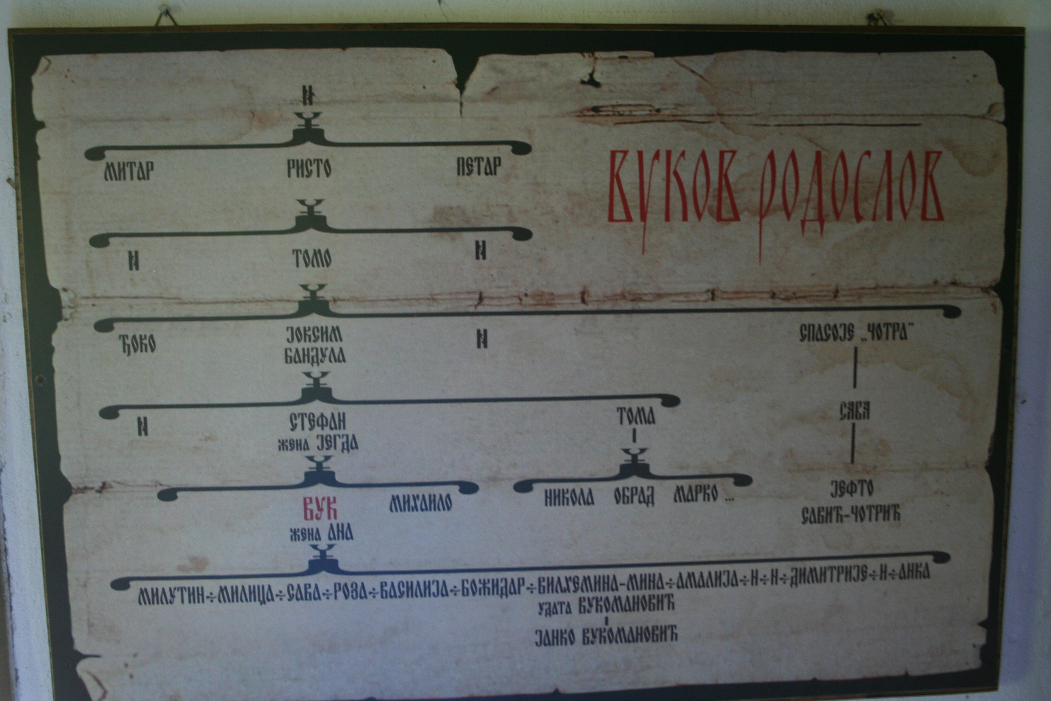 Spomen kuća Vuka Karadžića, Tršić